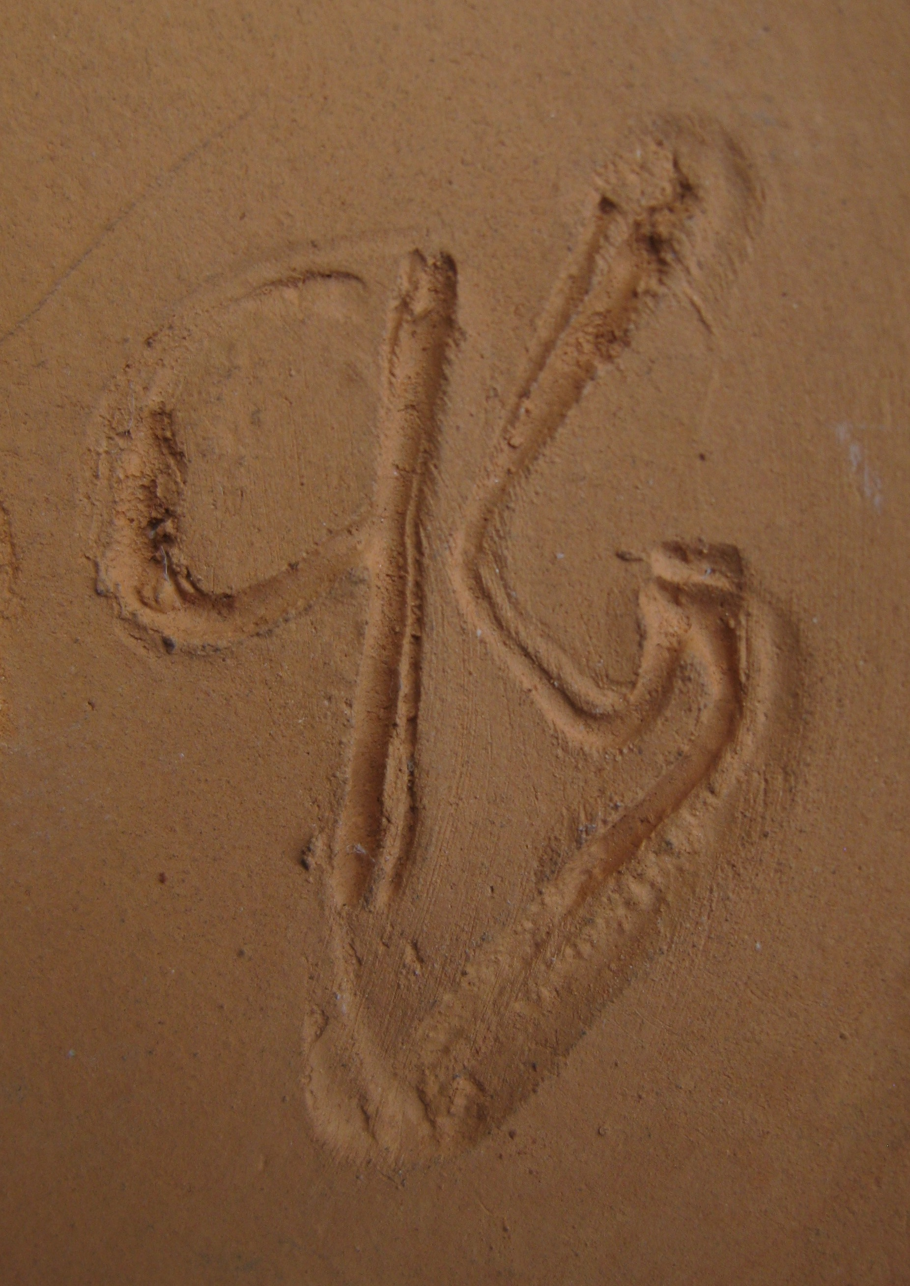 Augusta Kaisers Monogramm „GK“ (Gust Kaiser), von ihr als „Manufakturzeichen“ benannt, als zeichnerischer Entwurf erstmals vorgestellt in dem Brief vom 26.08.1924 aus Kiel an Lotte Boltze. Hier auf dem Boden der Kieler Kunst-Keramik „Junge (Blumenhalter)“, Formnummer 401, 1924, unglasiert, Norddeutsche Privatsammlung